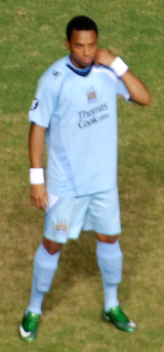 Robinho